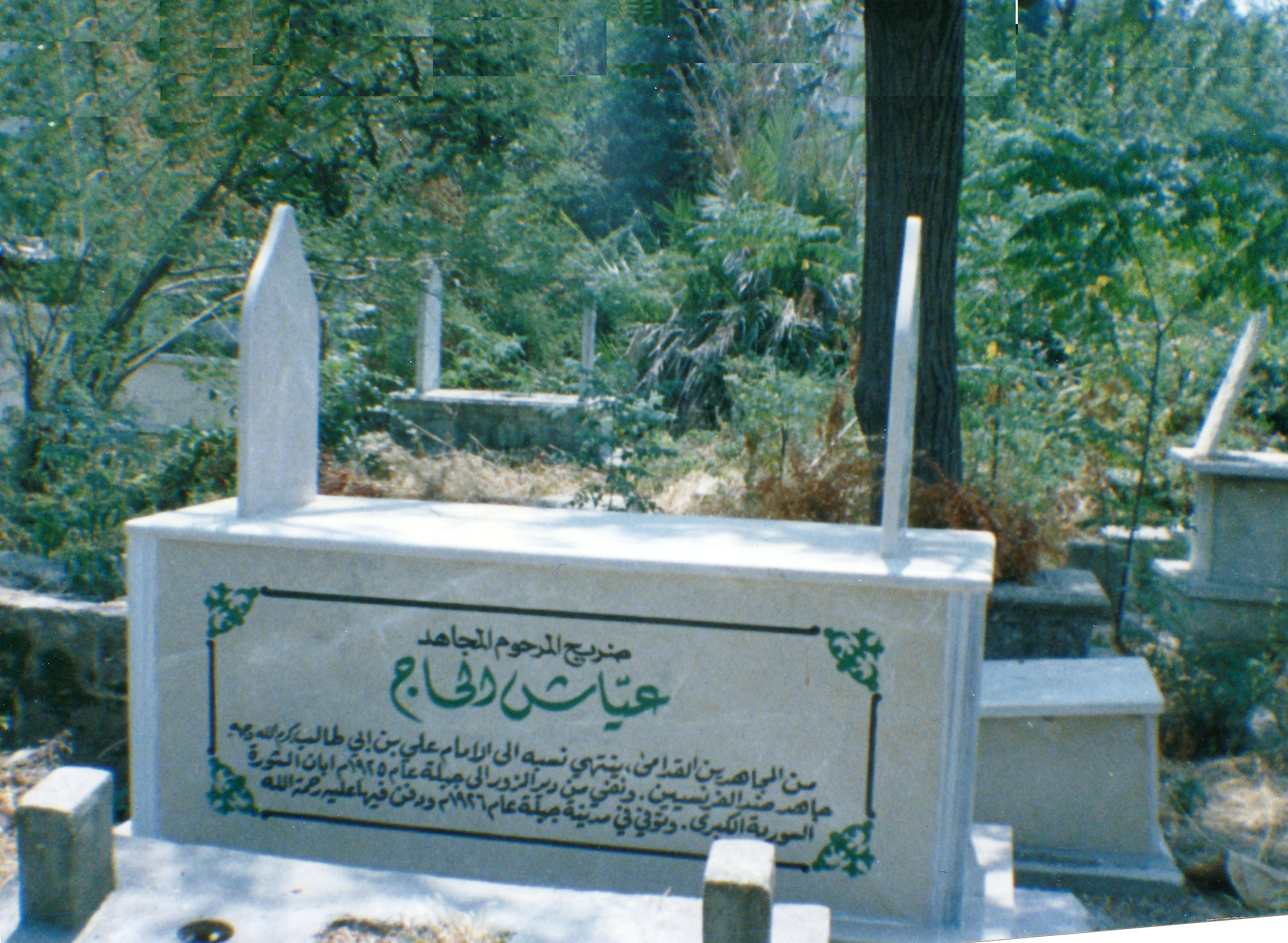 ضريح المجاهد عياش الحاج حسين الجاسم في مدينة جبلة السورية الذي نفاه المستعمر الفرنسي هو وأبناء أسرته من مدينته دير الزور إلى جبلة عام 1925 بسبب نضال العائلة المسلح ضد الفرنسيين.